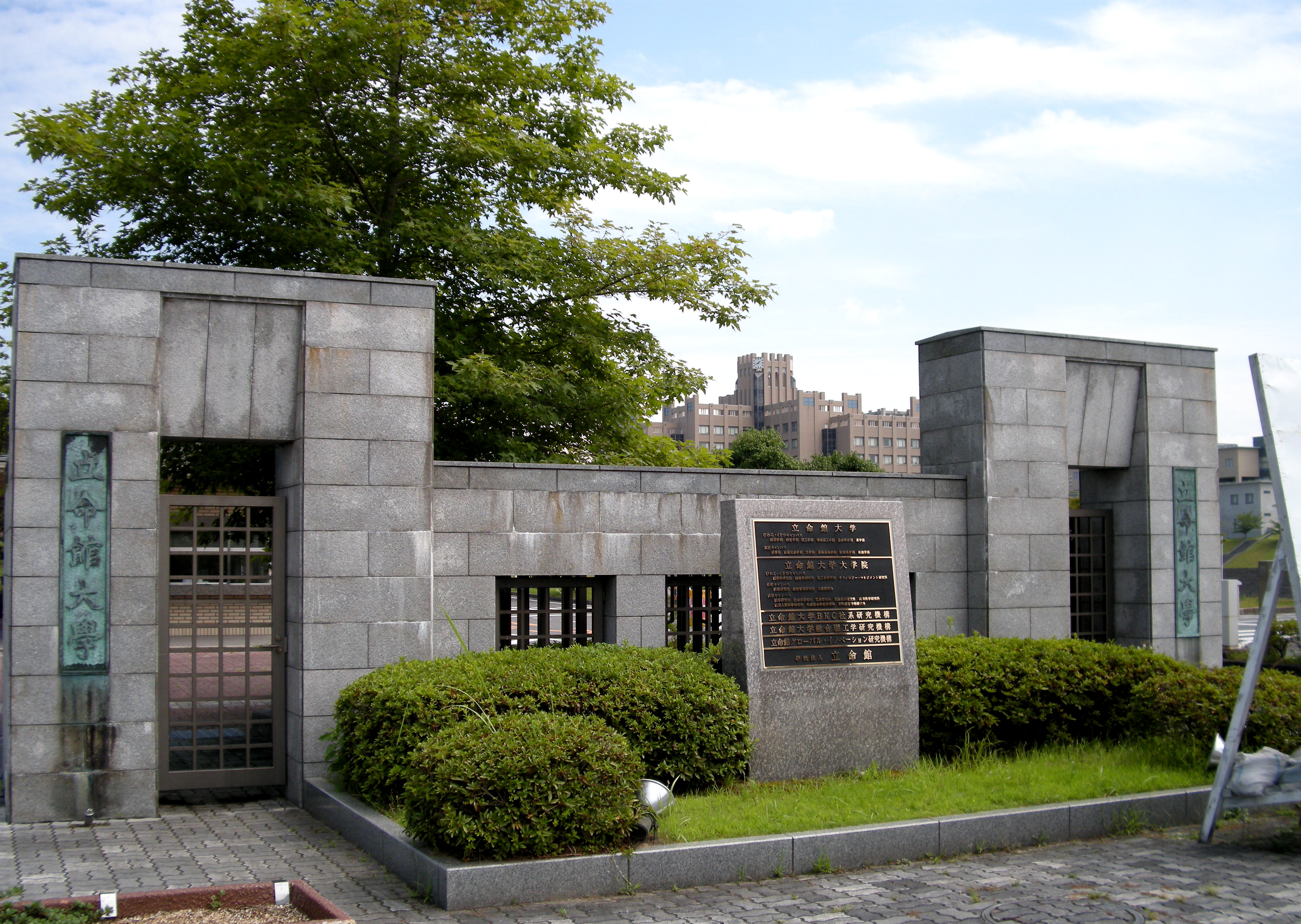 Main Gate, (Biwako Kusatsu Campus, Ritsumeikan University, Japan)